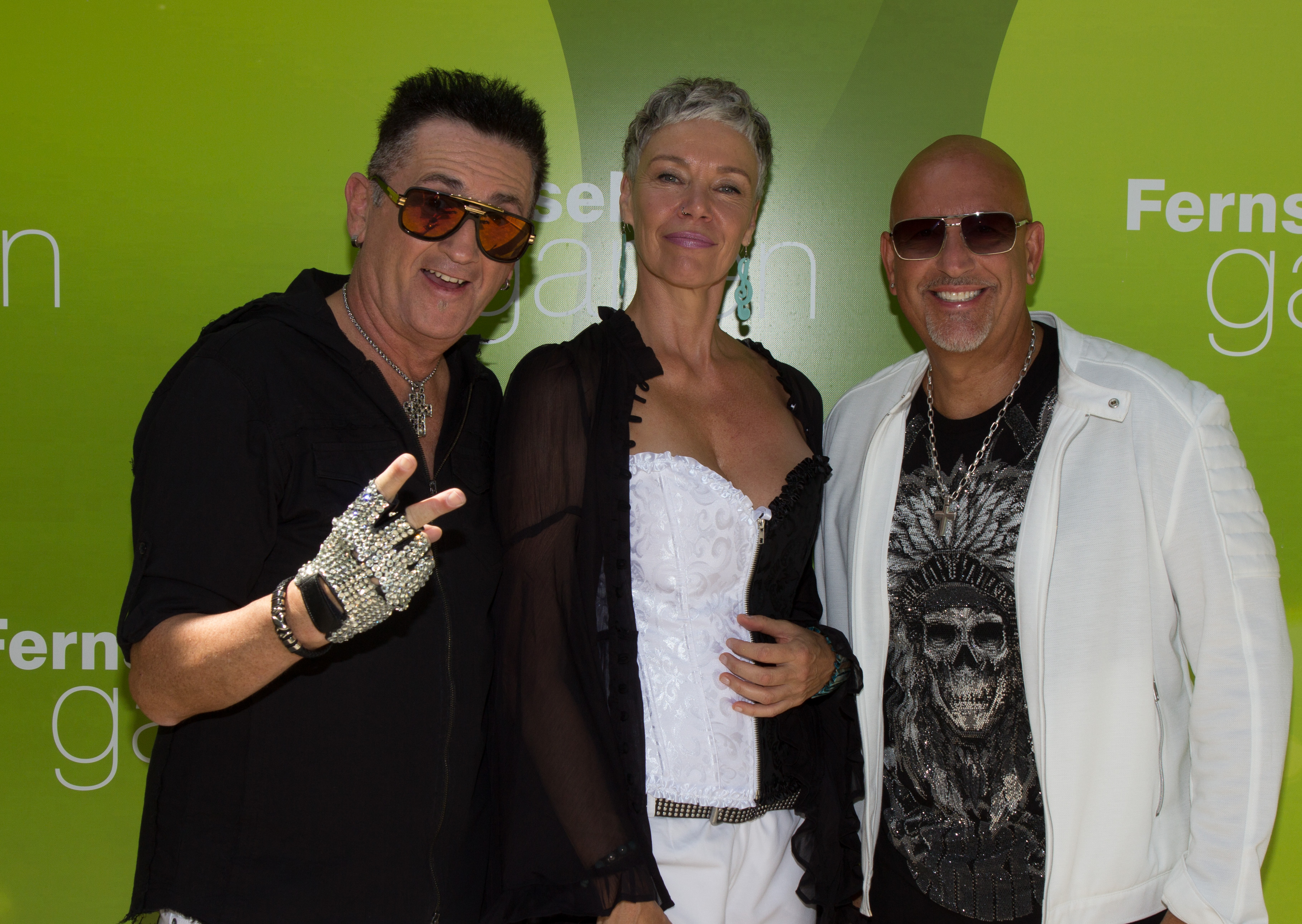 Masterboy feat. Beatrix Delgado als Gast im ZDF-Fernsehgarten am 12. August 2018 in Mainz.